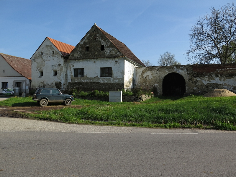 Dva špýchary usedlosti čp. 1, Horní Třebonín 1, Horní Třebonín.